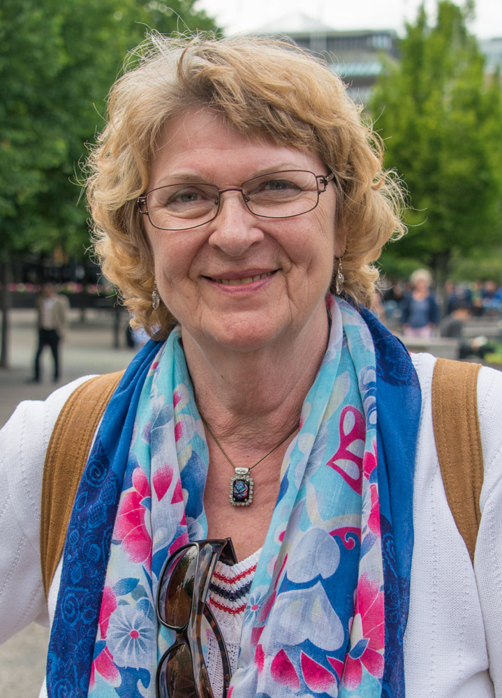 Jeja Sundström på Stockholms Visfestival i Kungsträdgården i Stockholm den 12 juli 2015.